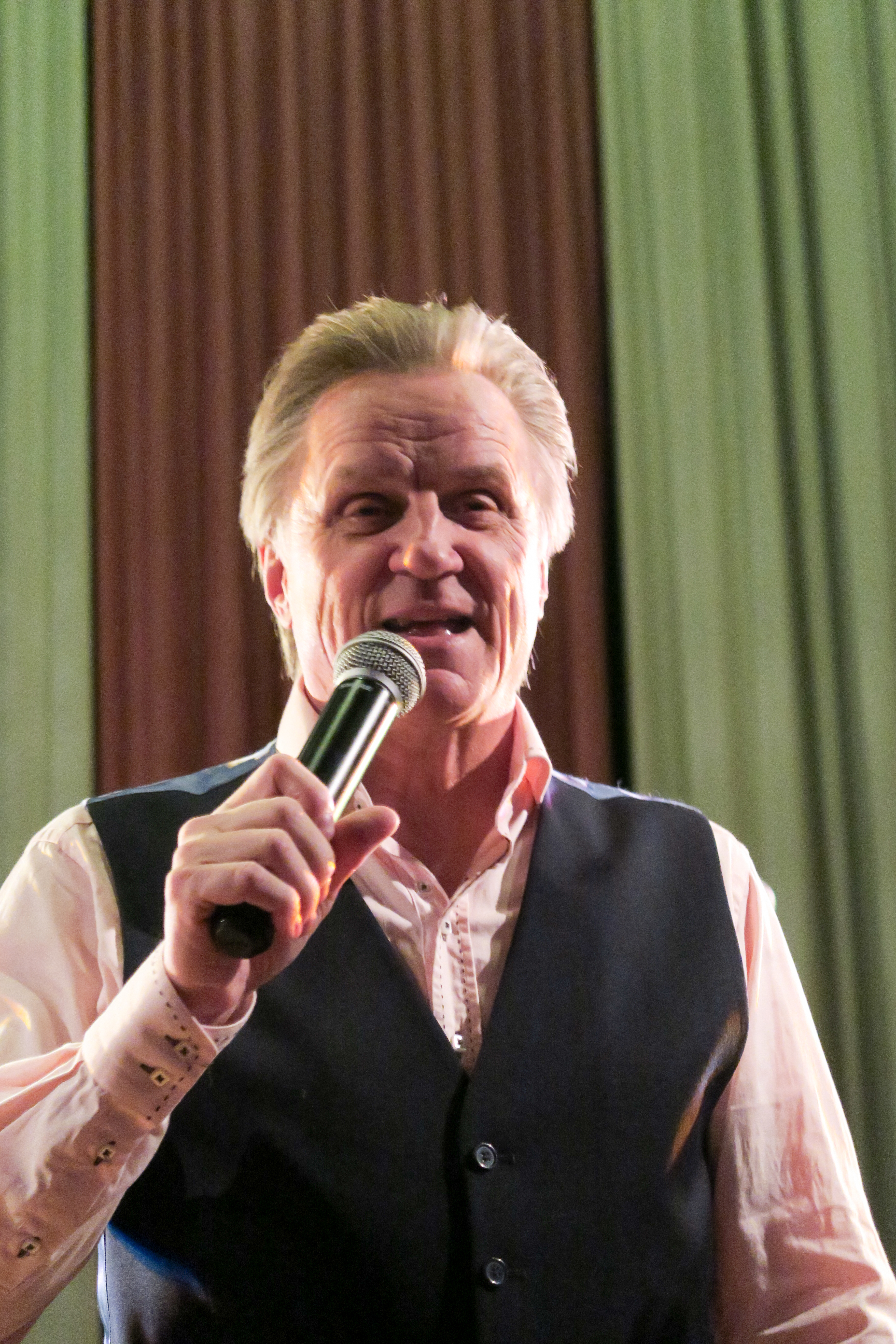 Juhamatti suomalainen laulaja